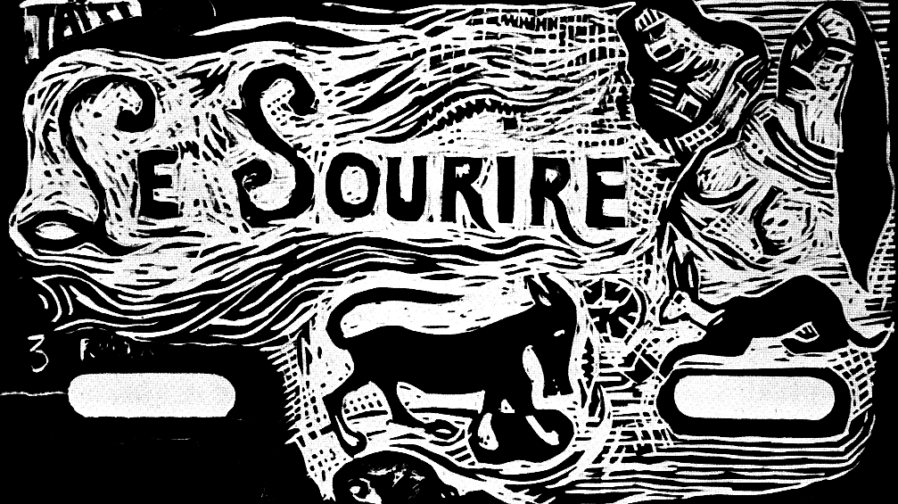 Paul Gauguin – "Le Sourire", woodcut (1899)